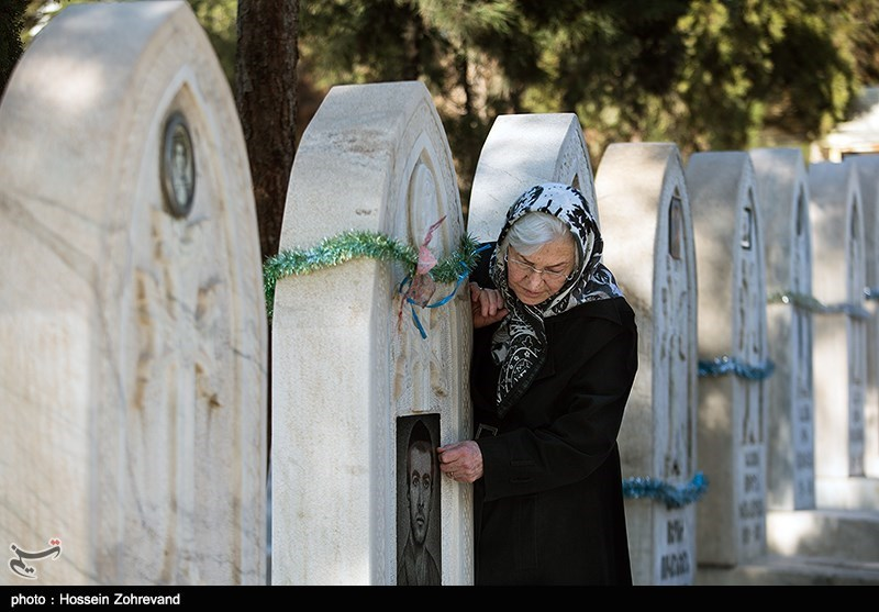 گورستان ارامنه تهران (بوراستان)